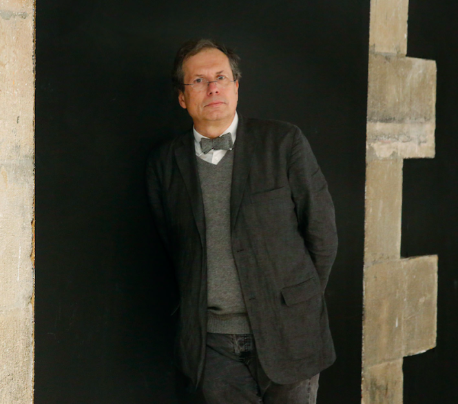 Filófoso italiano Maurizio Ferraris